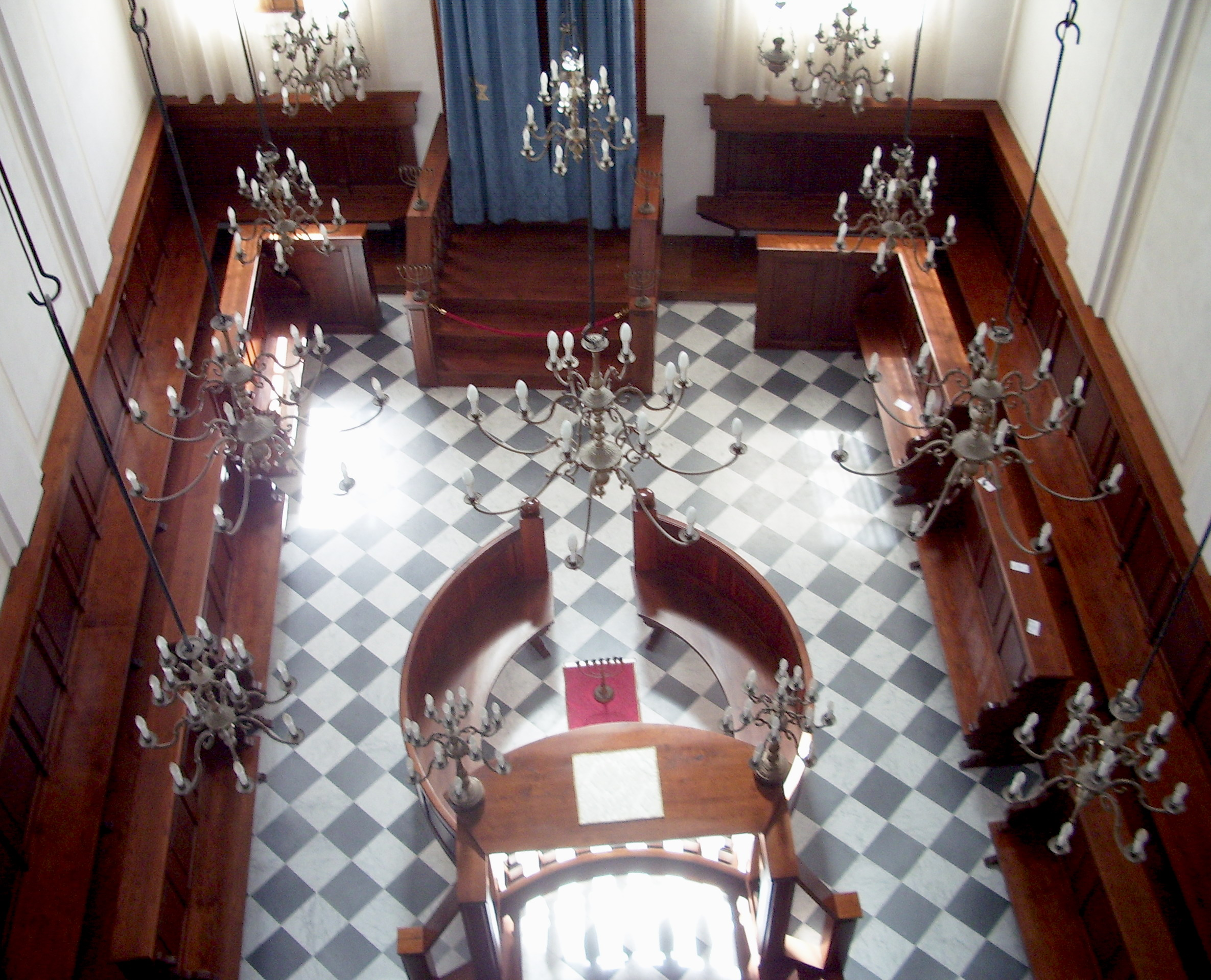 L'interno della Sinagoga di Pitigliano visto dal matroneo